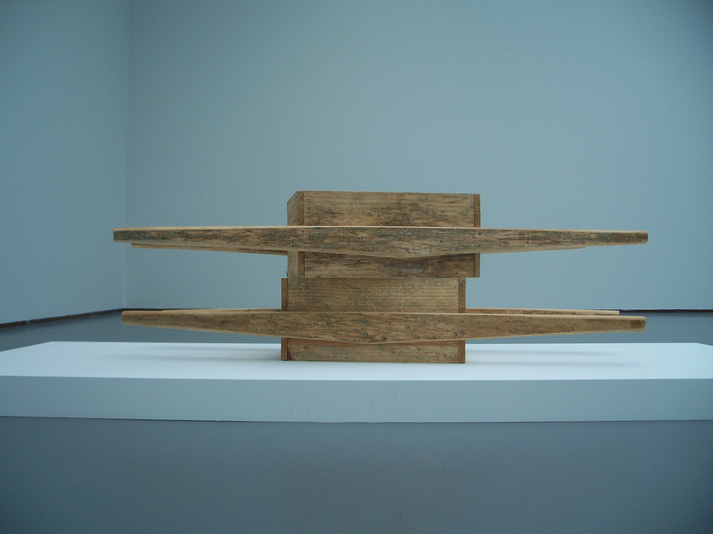 De Bólides (vuurballen) waren zo geconstrueerd dat de beschouwer ze kon manipuleren om zelf variaties in vorm en kleur te ervaren. Ze zijn daar nu helaas te kwetsbaar voor.